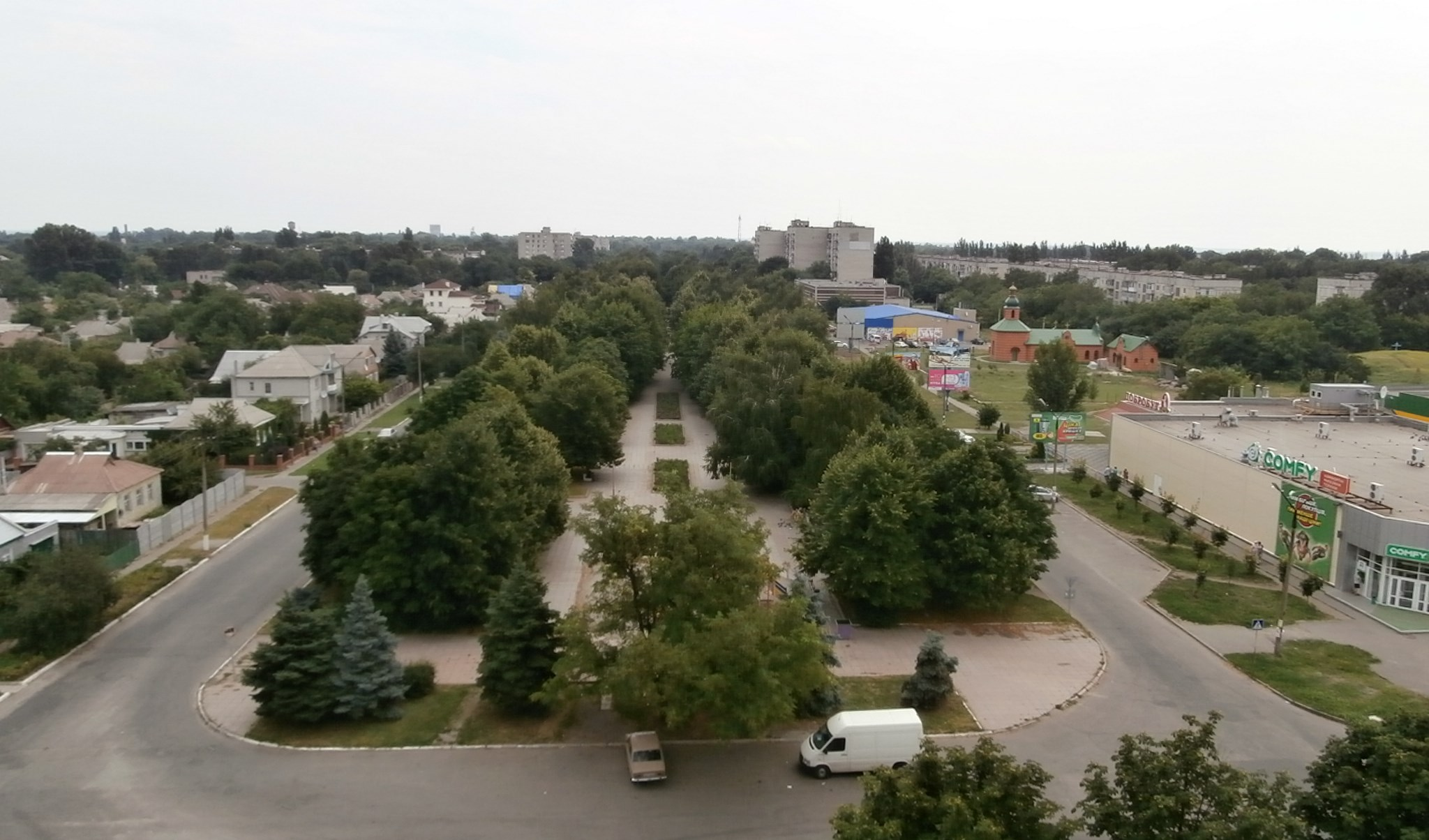 Schowti Wody Petrowsky-Straße